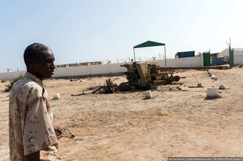 Бывшая советская береговая пушка, привезённая в 1970-е гг. для 527 ПМТО ВМФ СССР